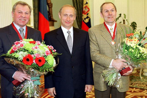 МОСКВА, КРЕМЛЬ. Церемония вручения российским хоккеистам Борису Майорову (слева) и Вячеславу Старшинову ордена «За заслуги перед Отечеством» III степени.